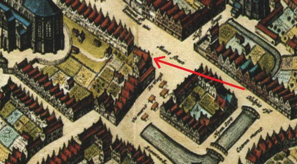 Uitsnede van de Kronenburg